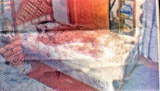 La cama dónde depositó los cuerpos de sus hijos